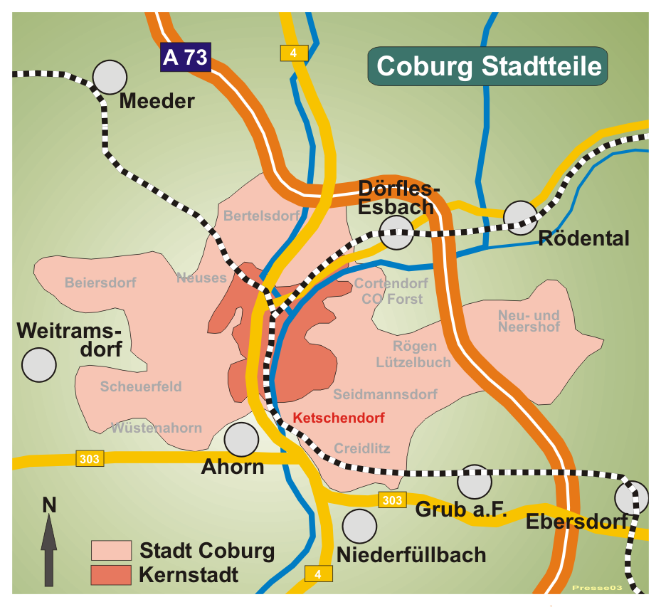 Karte von Coburg, Stadtteil Ketschendorf